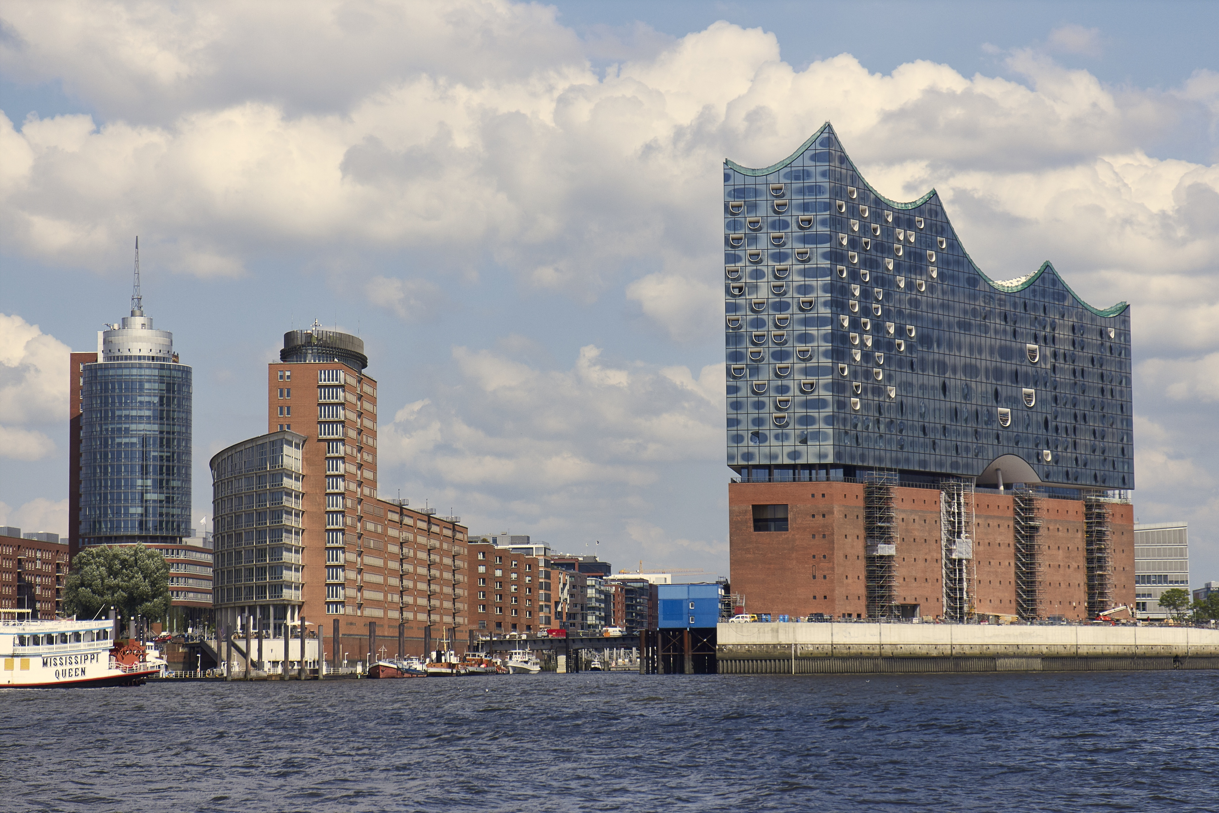 Elbphilharmonie - 4